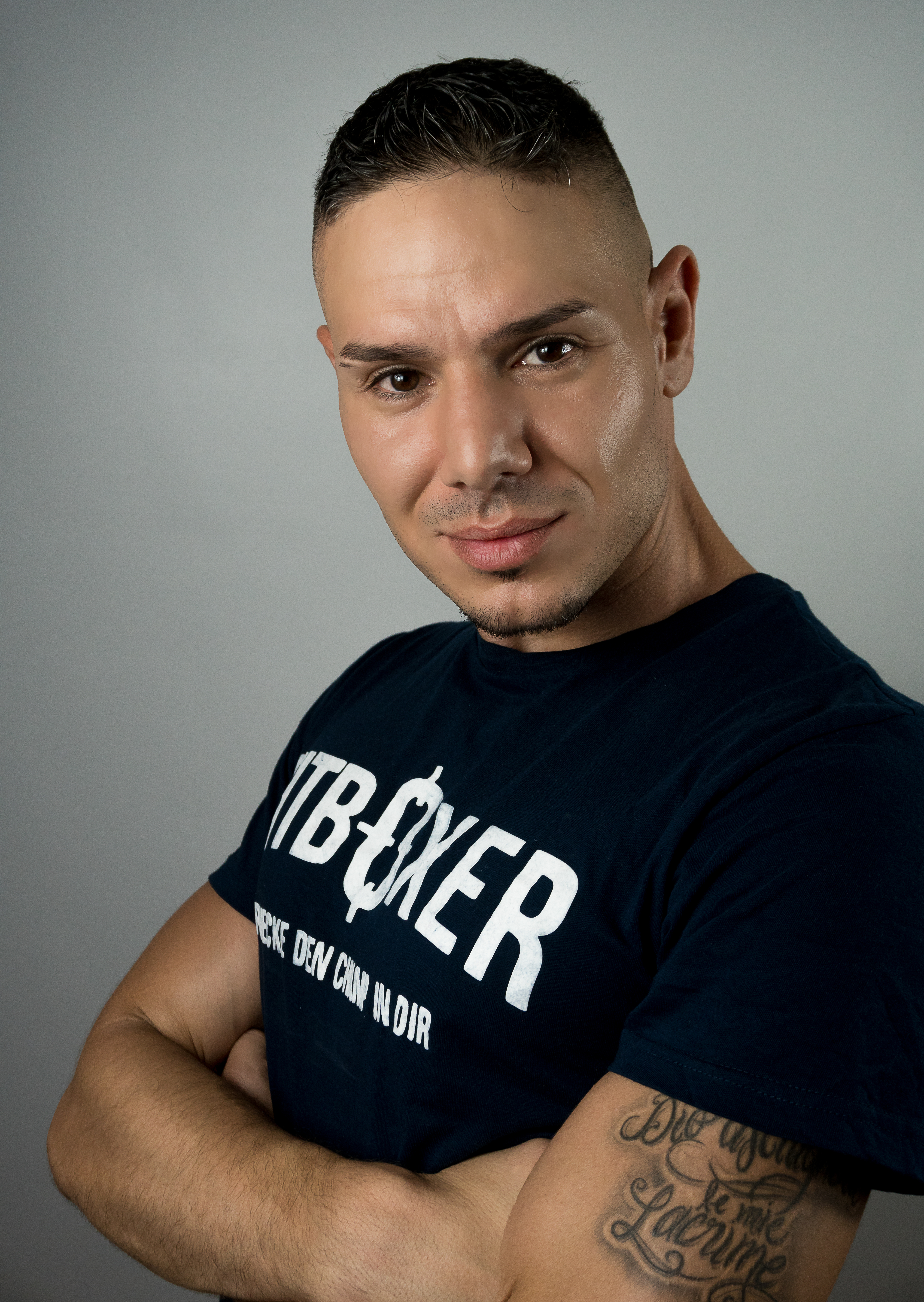 Profilbild Maurizio "The Headshot" Granieri